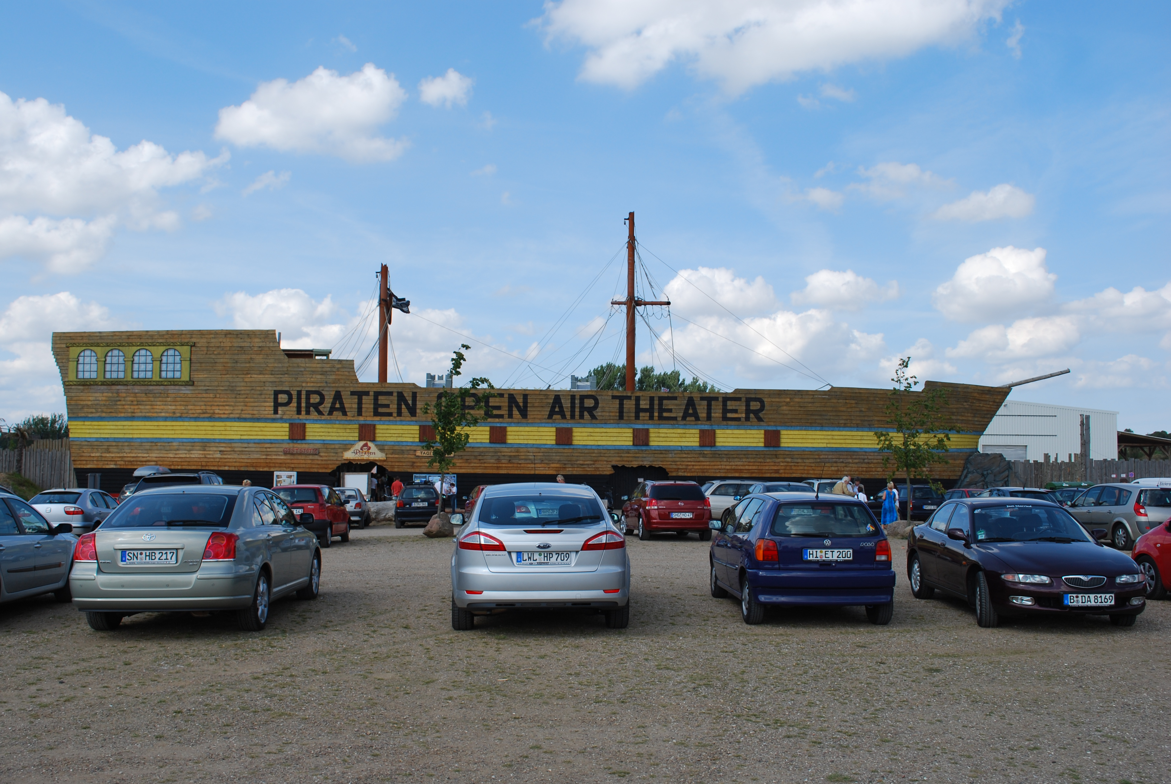 Piraten-Open-Air, Eingangsbereich